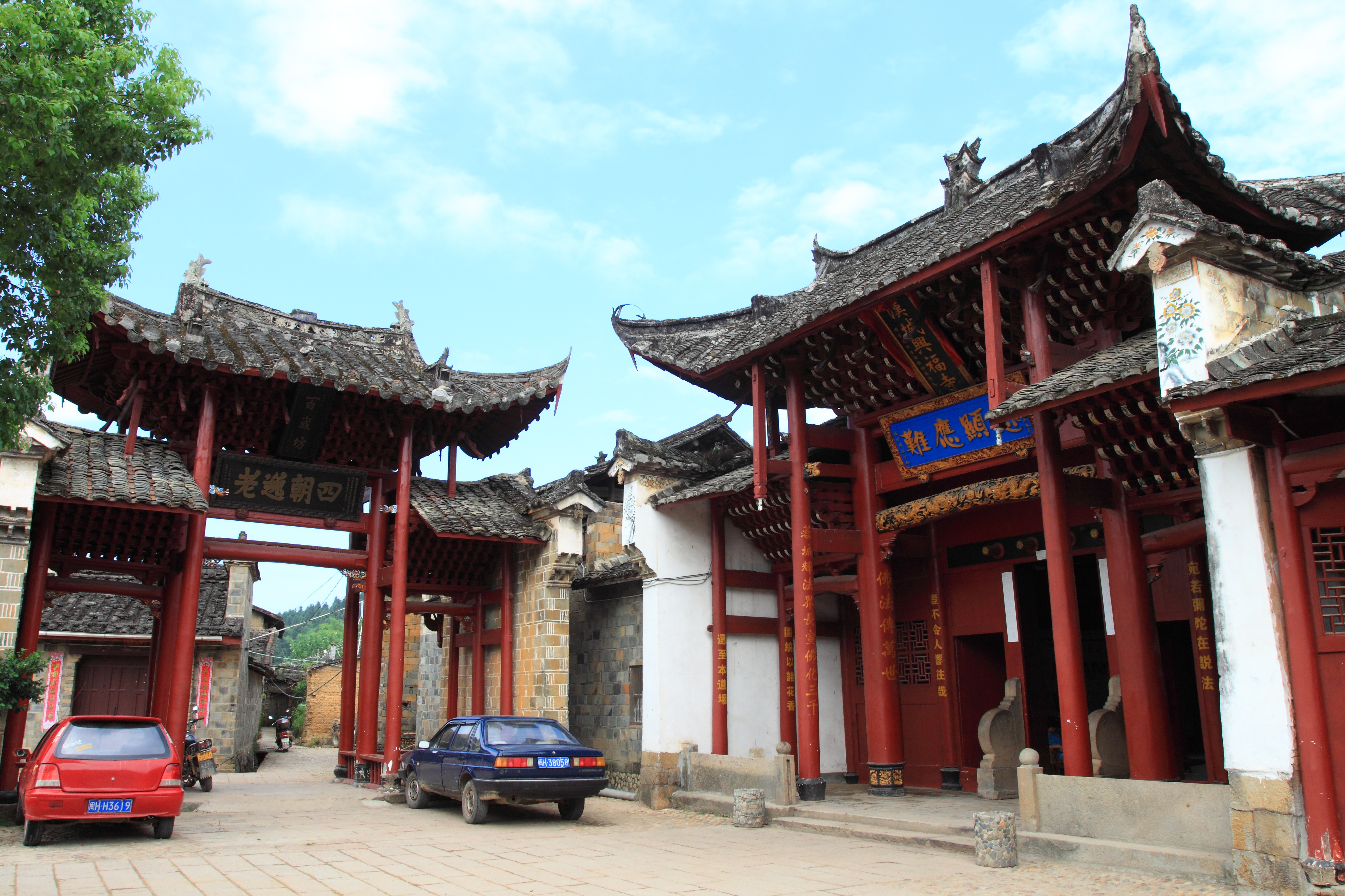 百岁坊和兴福寺（华光庙 ）